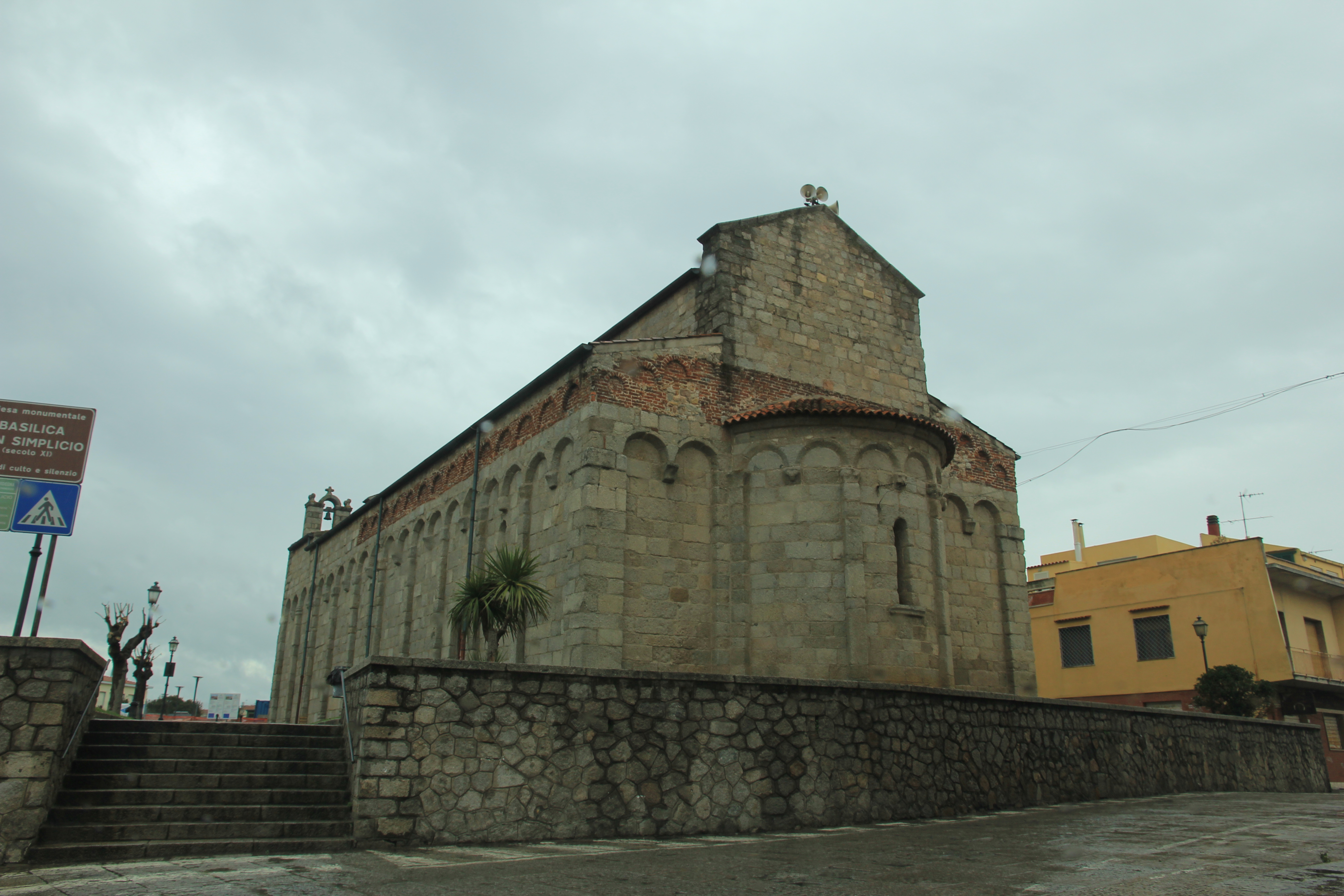 Olbia - Basilica di San Simplicio